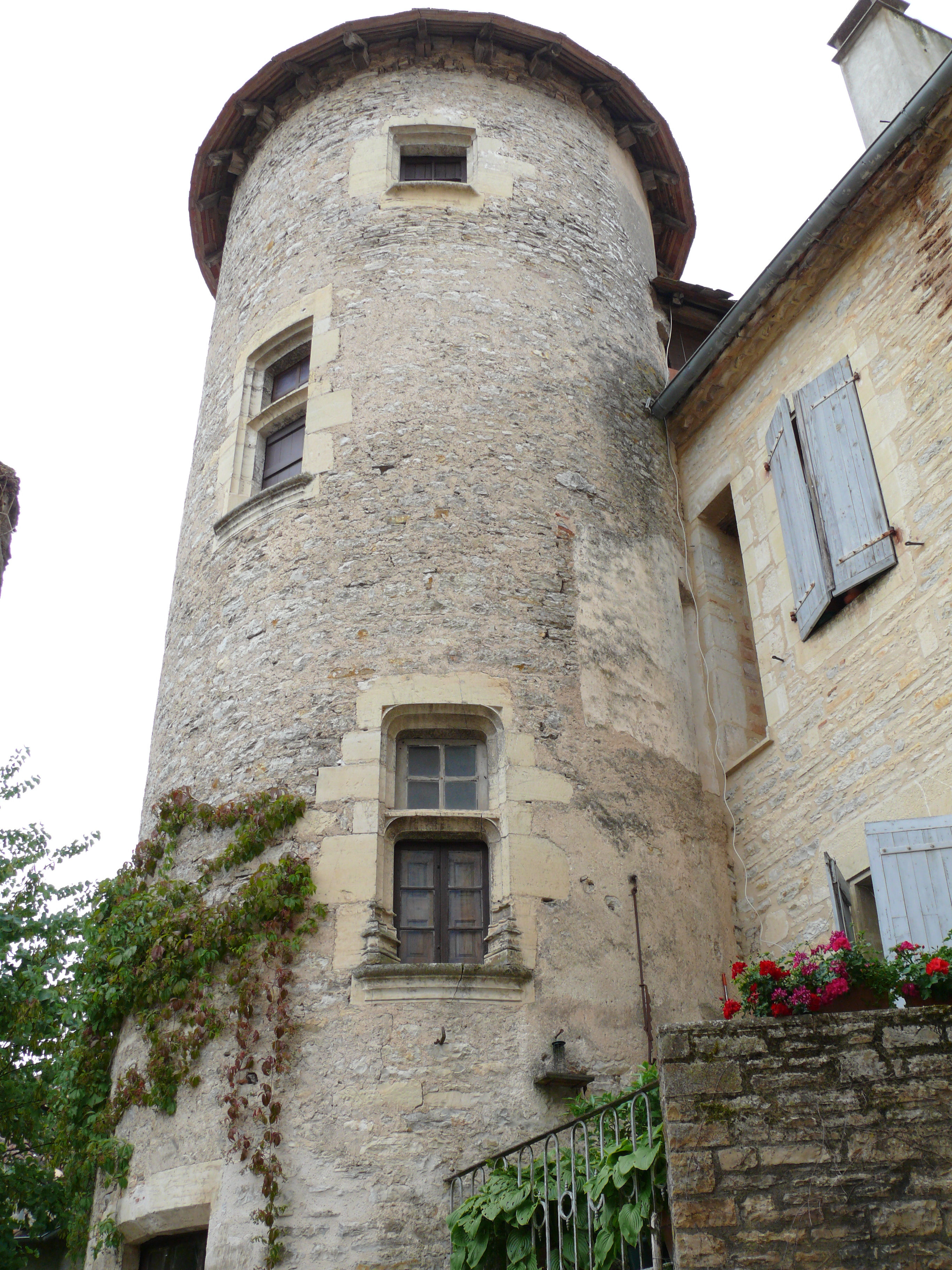 Catus - Tour de la maison du Prieur